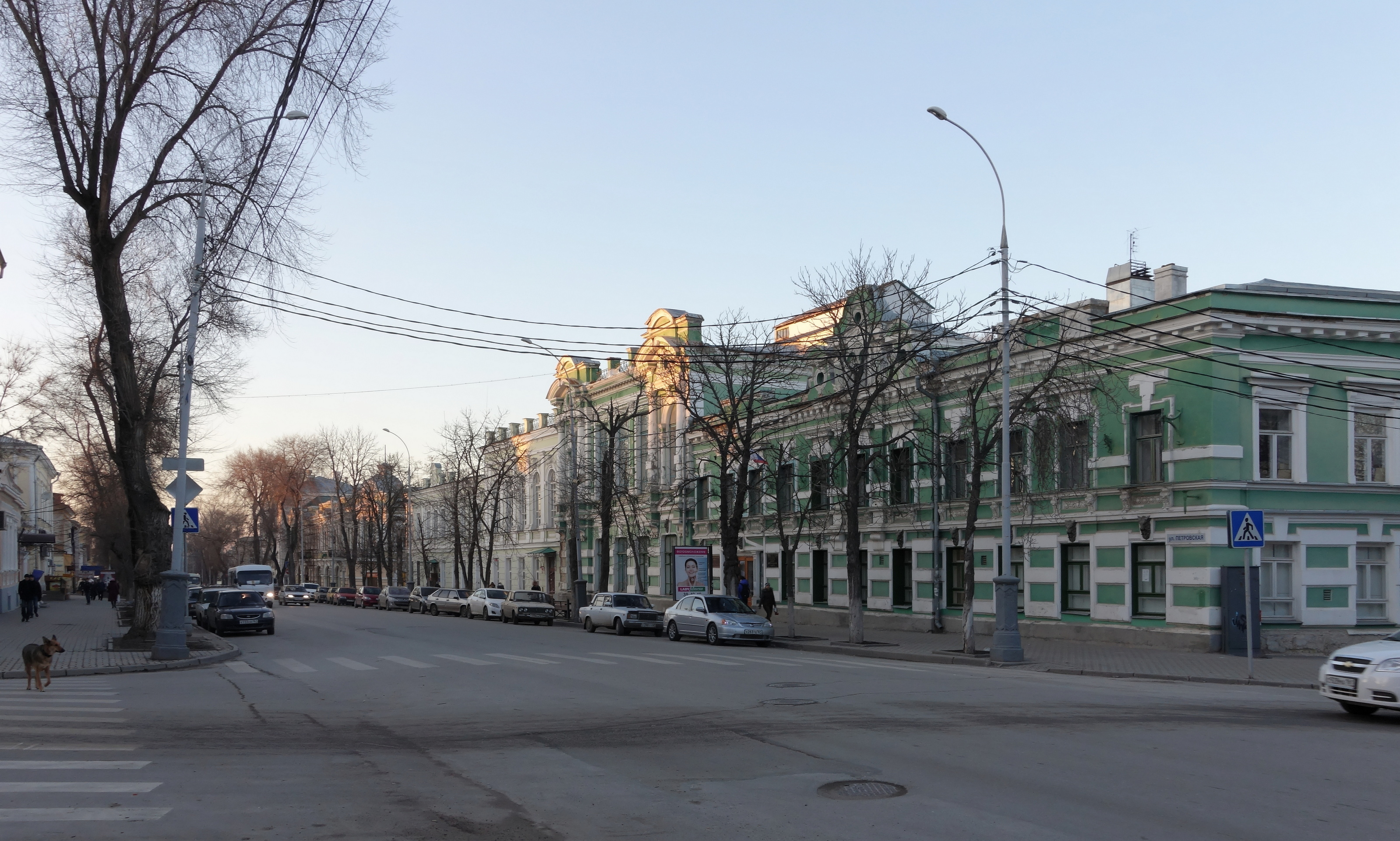 Taganrog Таганрог